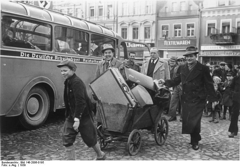 Der KdF Reichstheaterzug ist in Lissa eingetroffen. Die Jugend hilft den Schauspielern